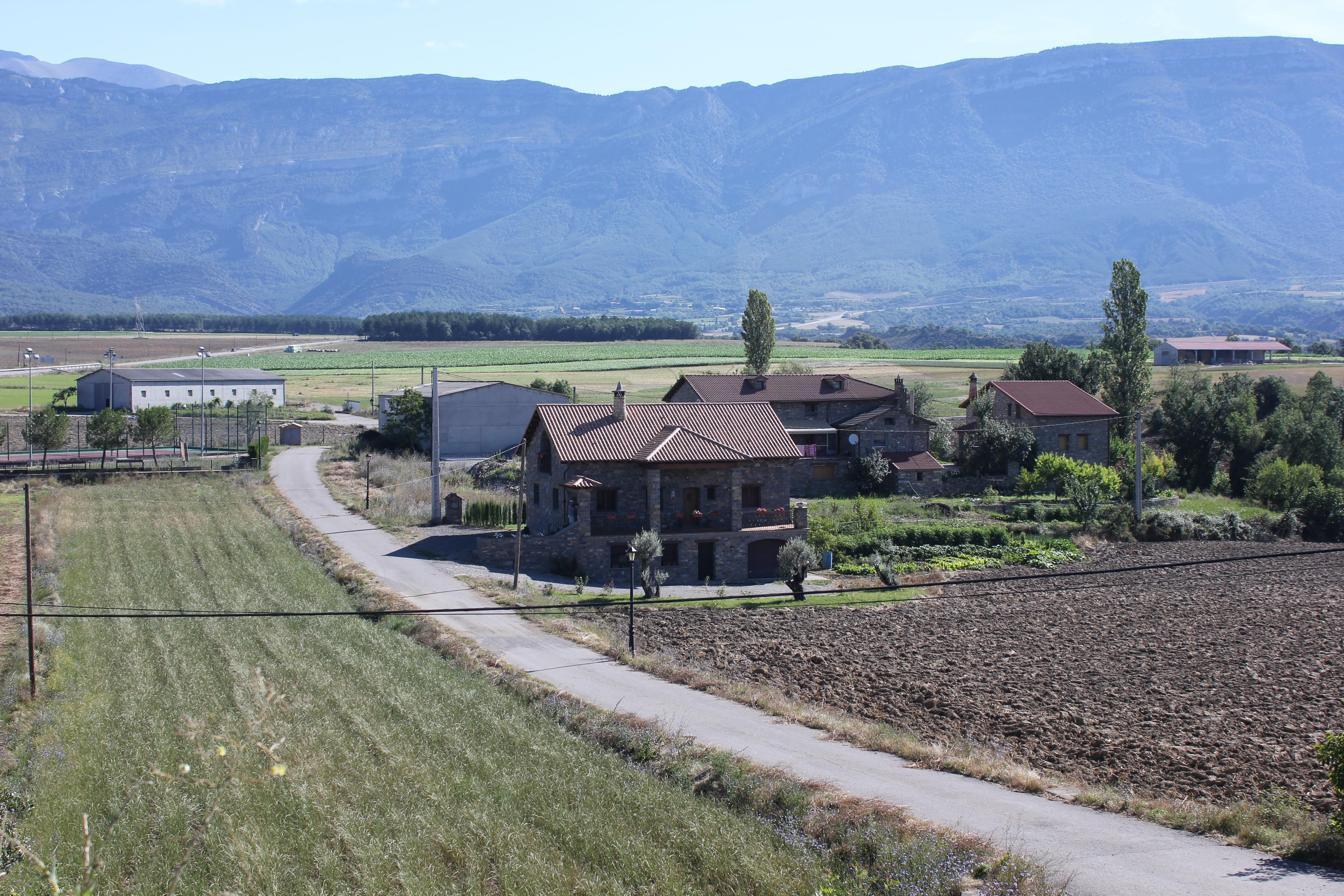 Aragonés: Fuent de Campo